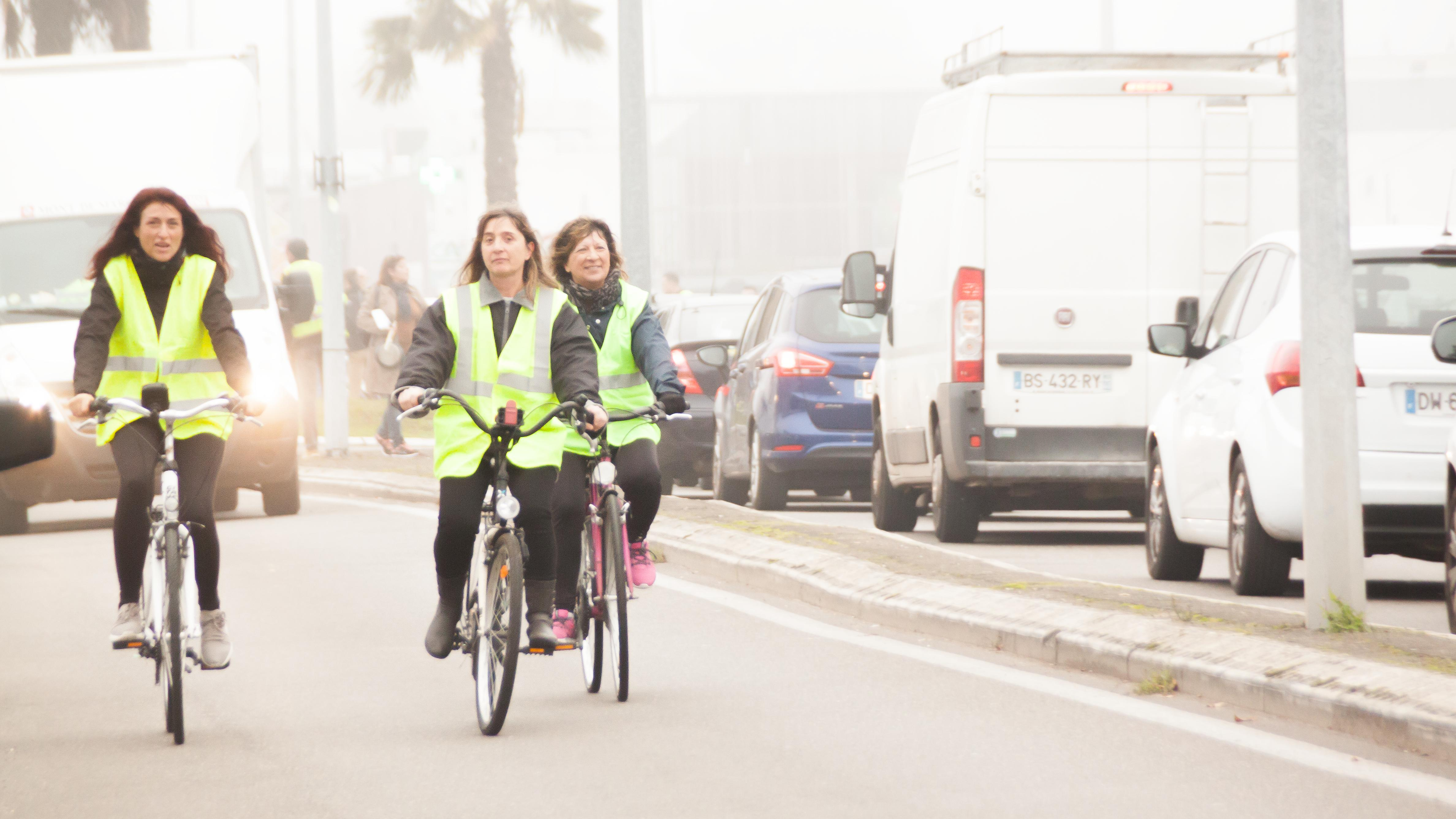 Girl power